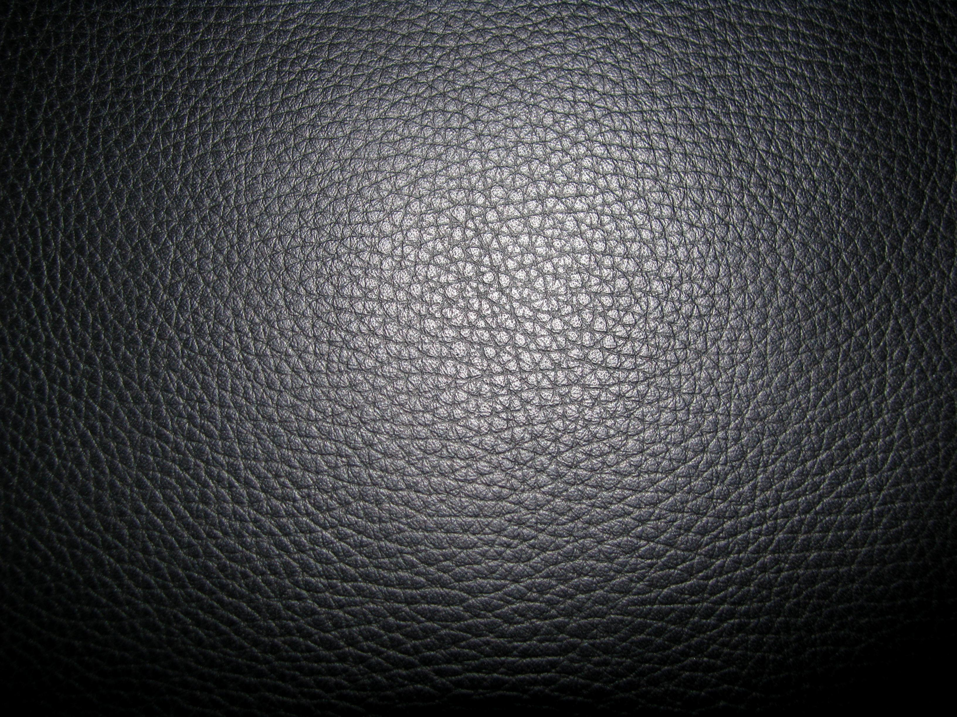 Nappaleder, Polstermöbel